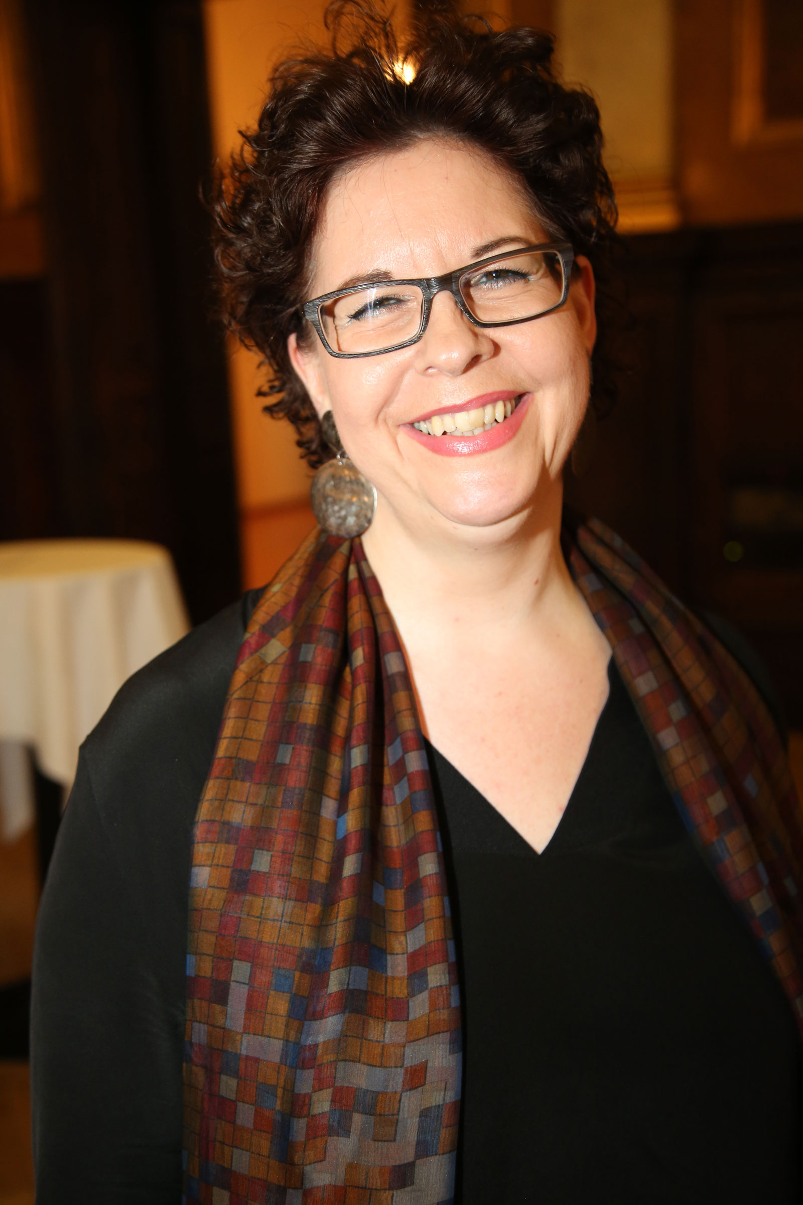 Christine Marek, Unternehmensberaterin